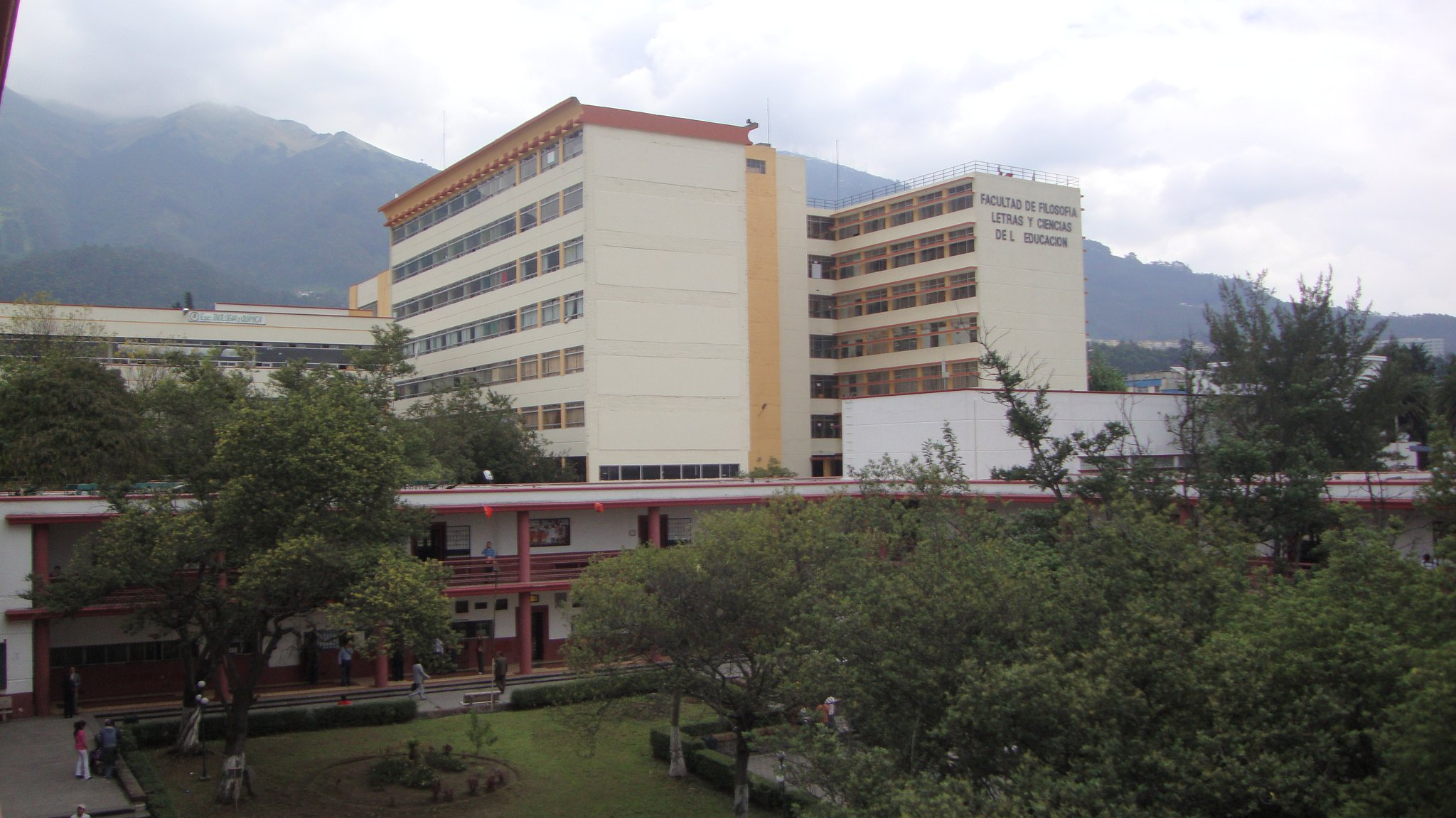 FACULTADES DE FILOSOFIA Y JURISPRUDENCIA DE LA UCE QUITO m.n